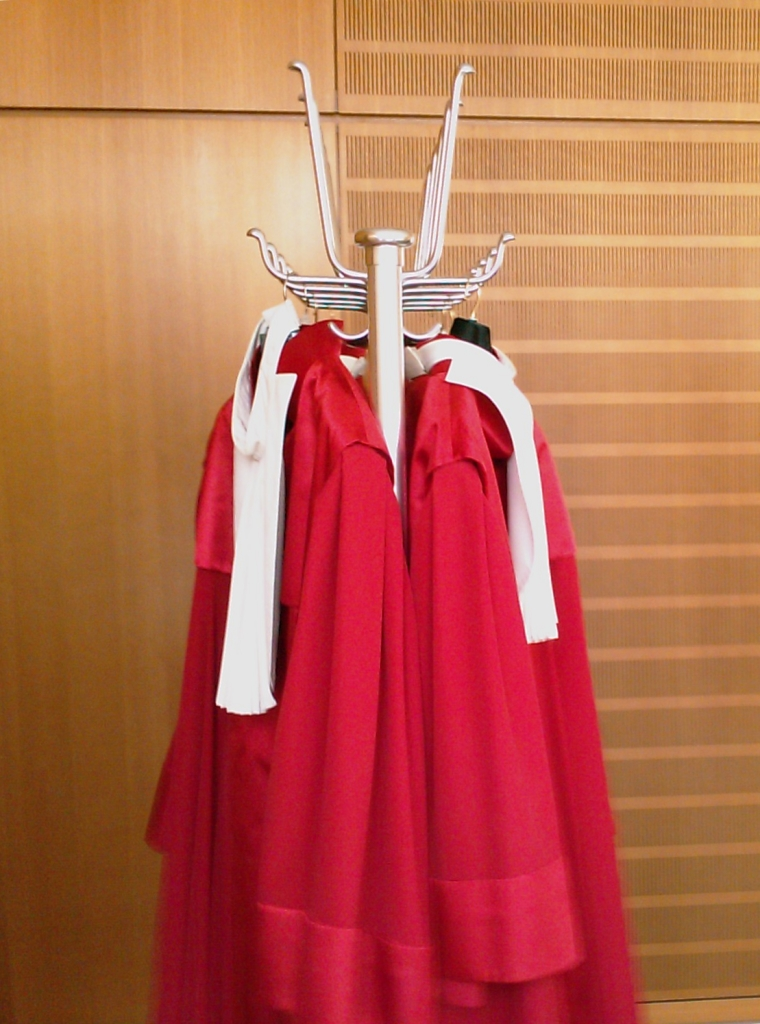 Richterroben am Bundesverfassungsgericht